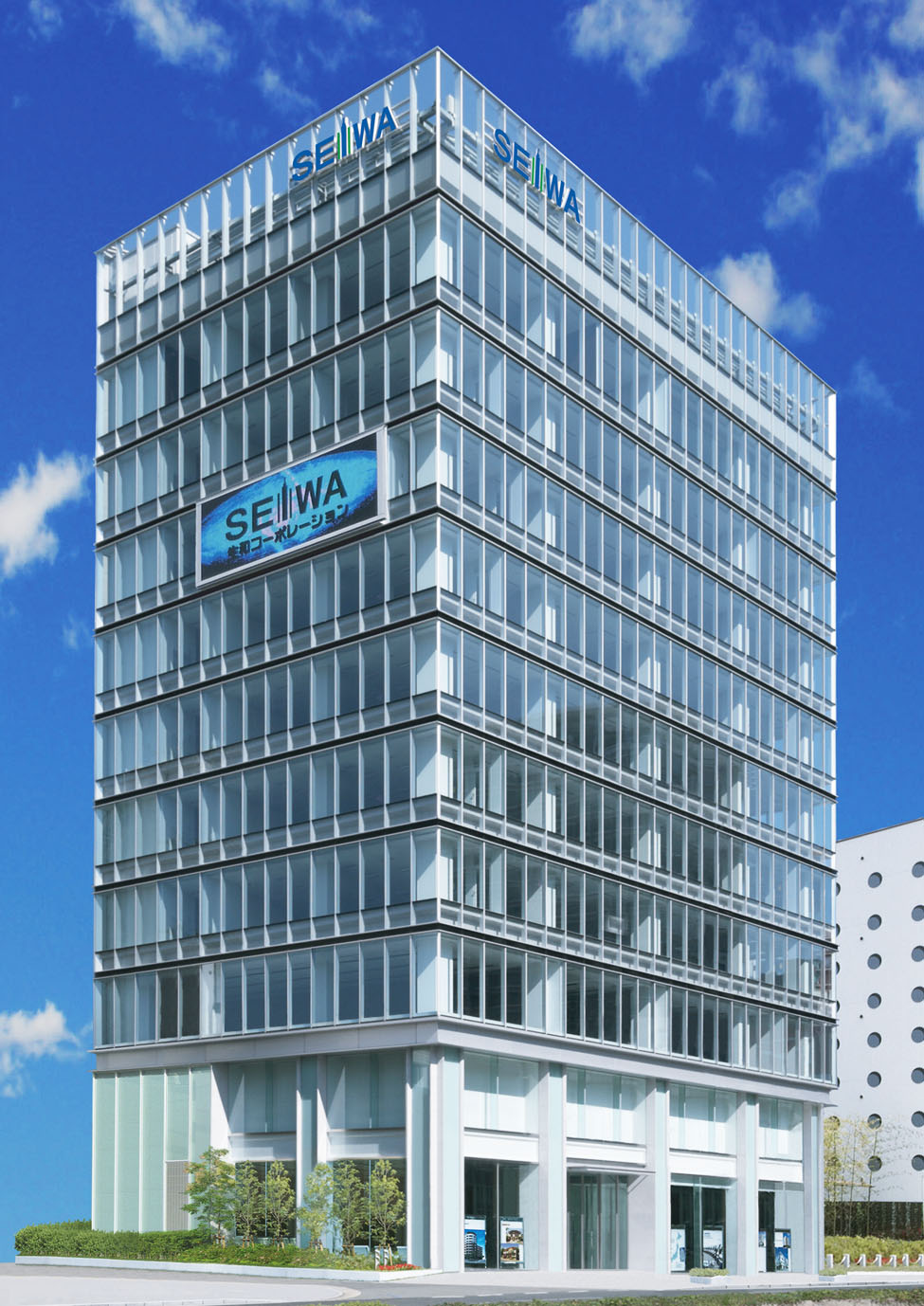 生和コーポレーション西日本本社ビル